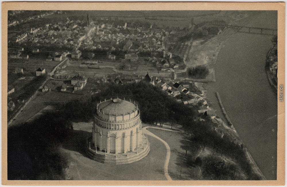 Bildseite der als Ansichtskarte vervielfältigten "Flug-Postkarte Nr. 656" der Flugphoto Verlags-Ges. mit einer „Flugzeugaufnahme von Kelheim“ ...